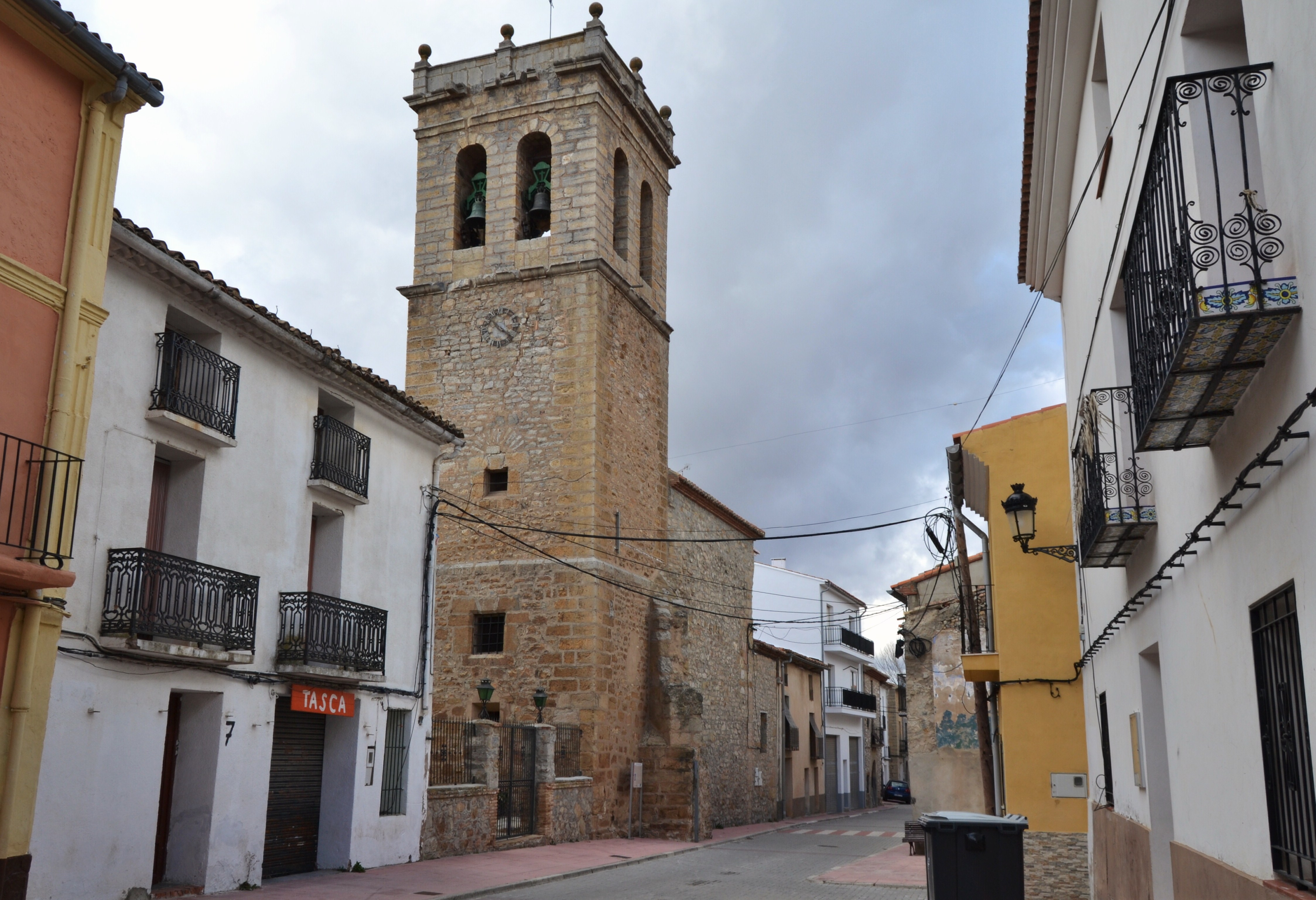 Carrer i campanar, Barracas, Alt Palància.